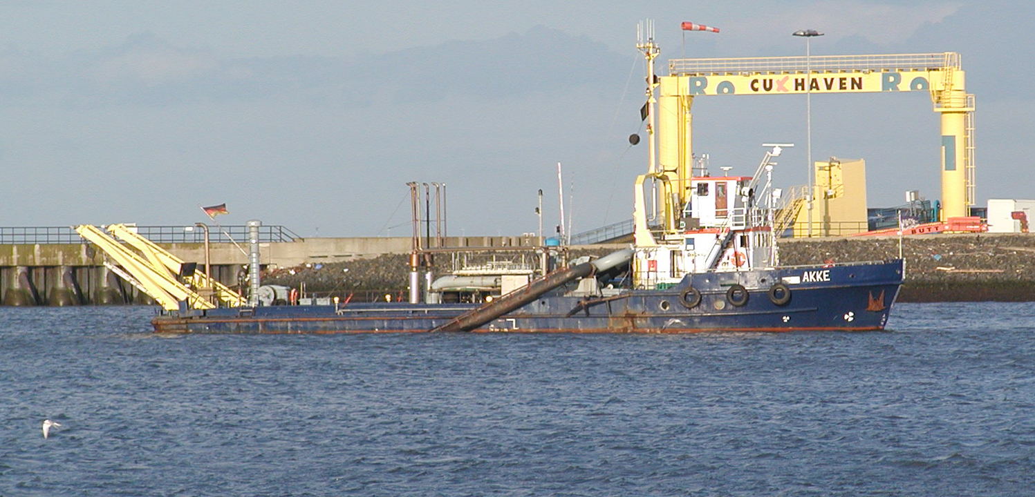 Im Hafen der kleine Saugbagger Akke IMO Number: 8842064 MMSI Number: 211233270 Callsign: DDDW Length: 46 m Beam: 11 m